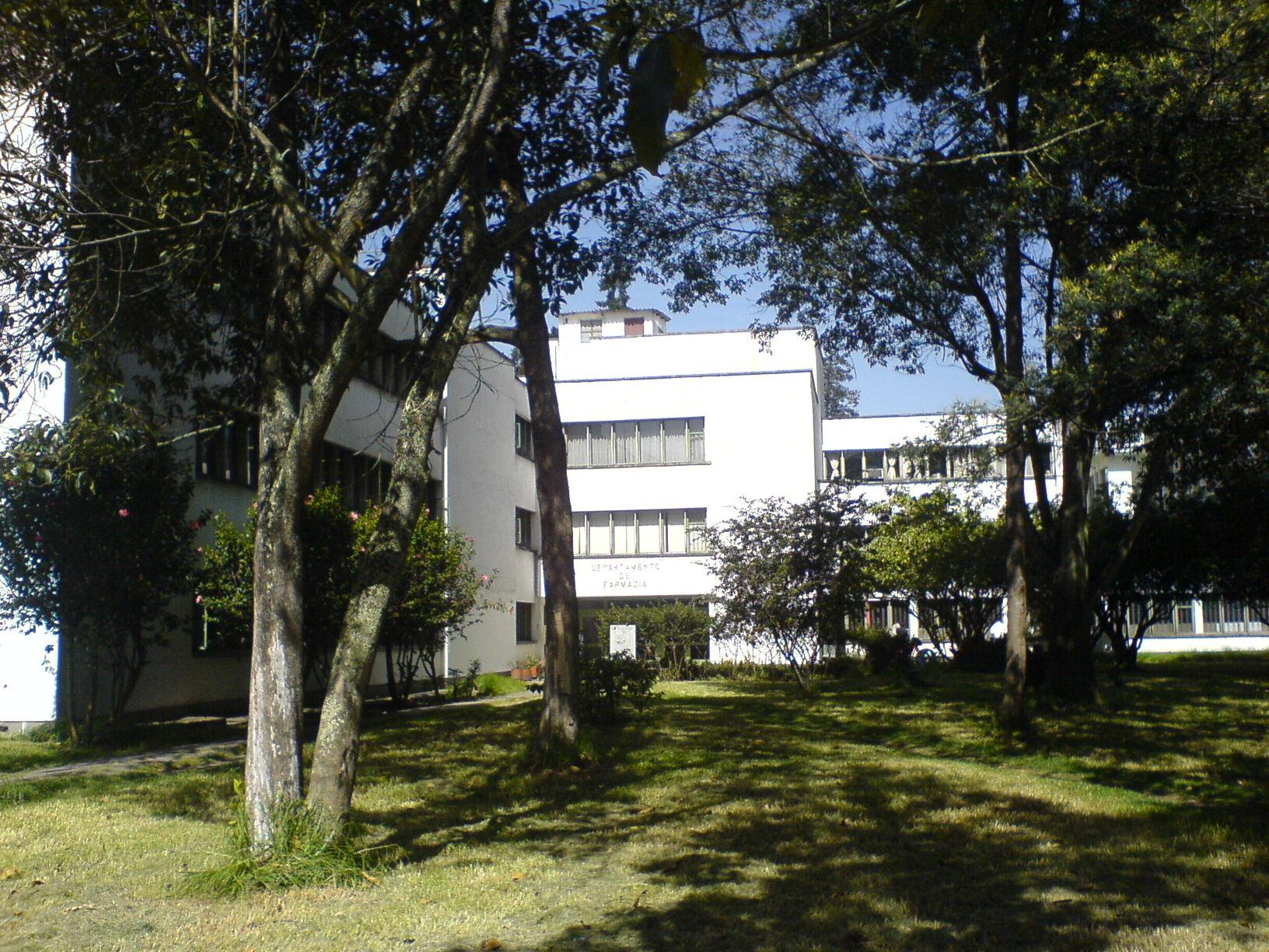 Departamento de Farmacia, UNAL Pharmacy Department